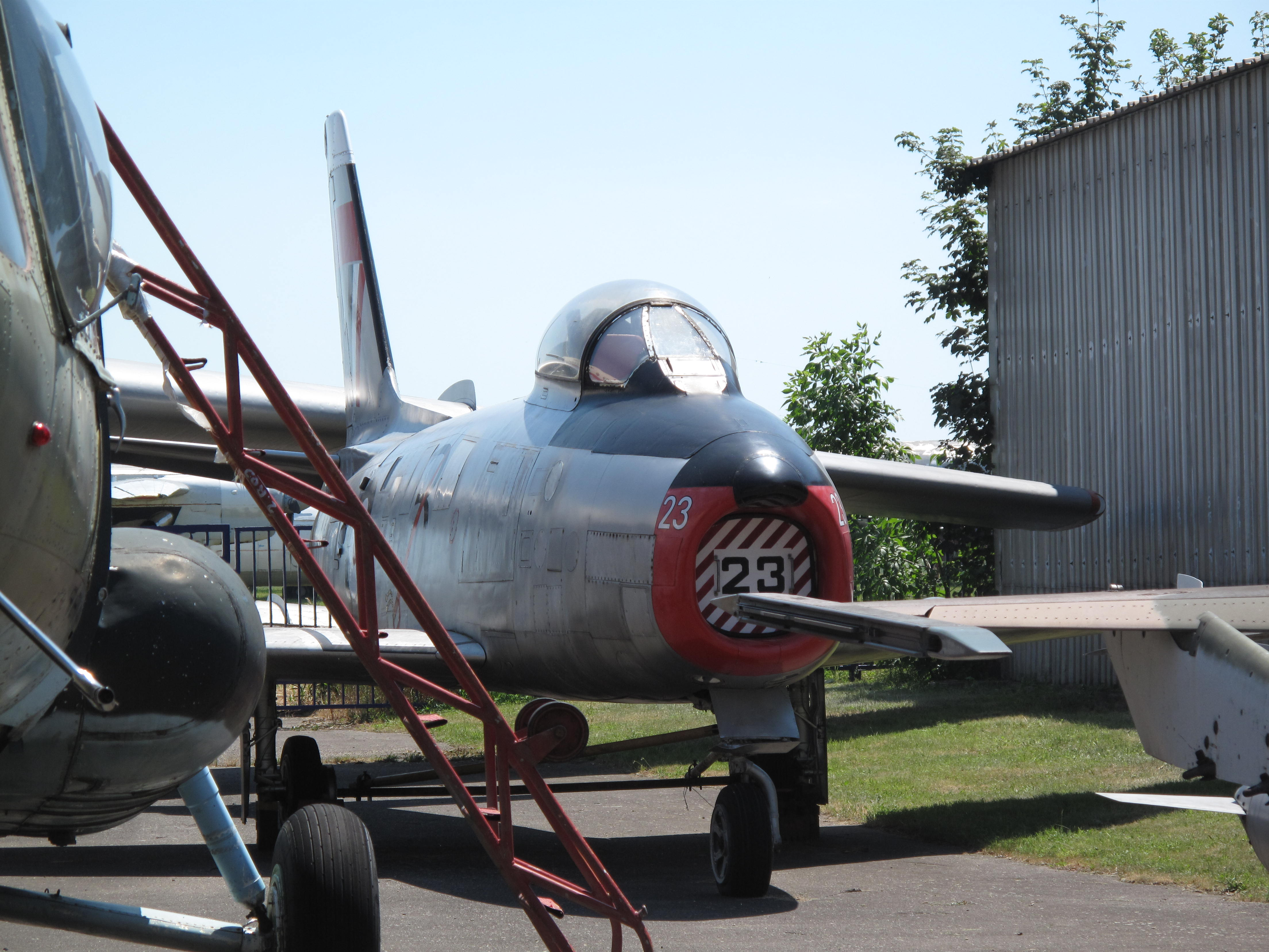 Letecké muzeum Kbely